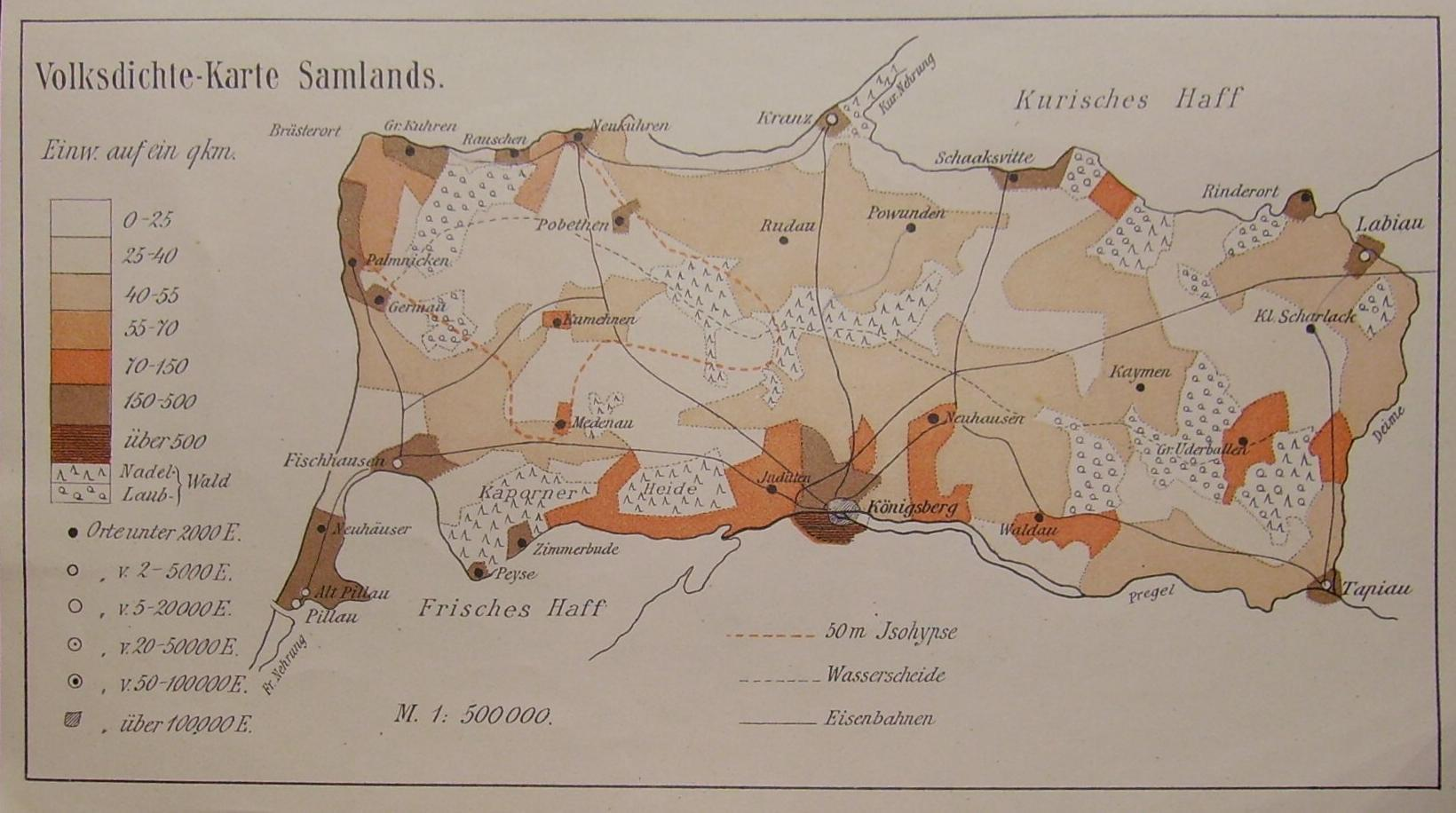 Landkarte zur Volksdichte des Samlandes